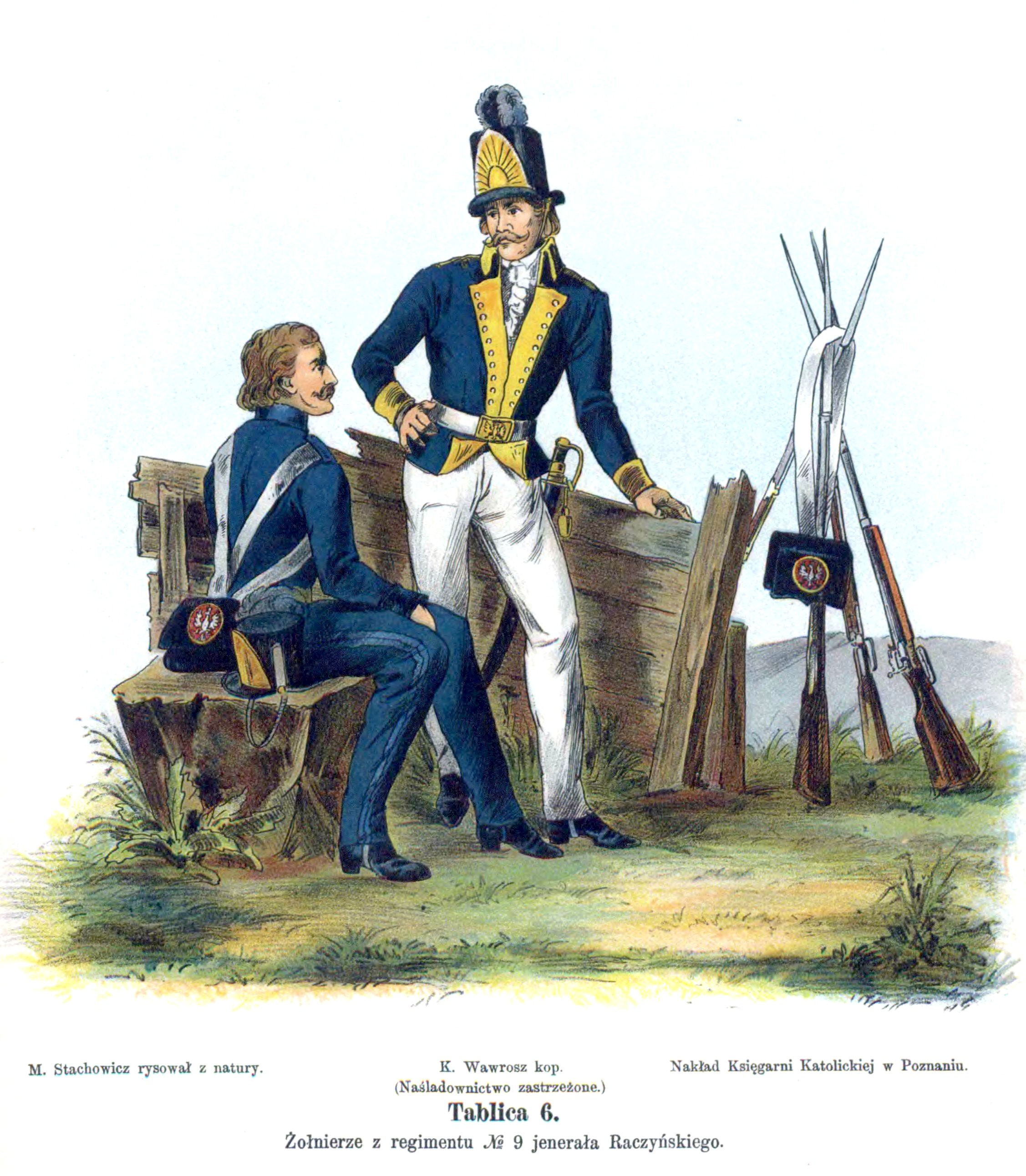 Kościuszko Uprising army